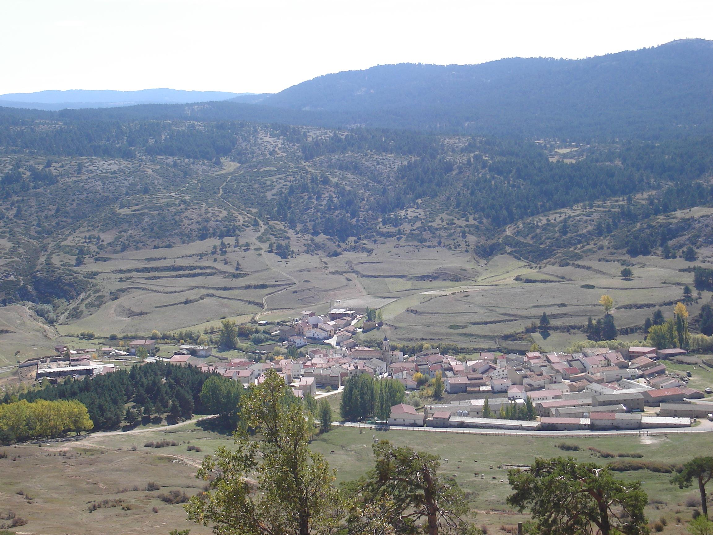 Vistas del municipio de Guadalaviar desde la Muela de San Juan.